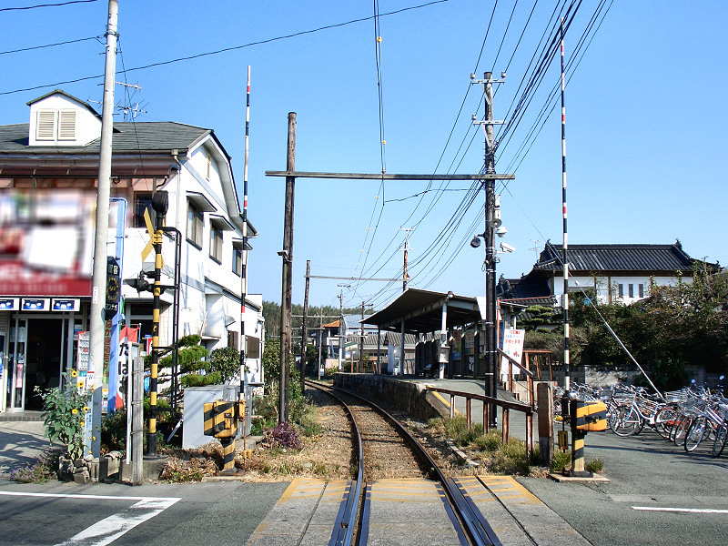 熊本電気鉄道須屋駅 奥が御代志駅方面、手前が北熊本駅方面。 撮影者/著者/著作権保有者 : MK Products (本人がアップロード) 撮影日 : 2006/09/24 須屋駅用にアップロードした画像です。良い画像があれば別の画像に変えてください。